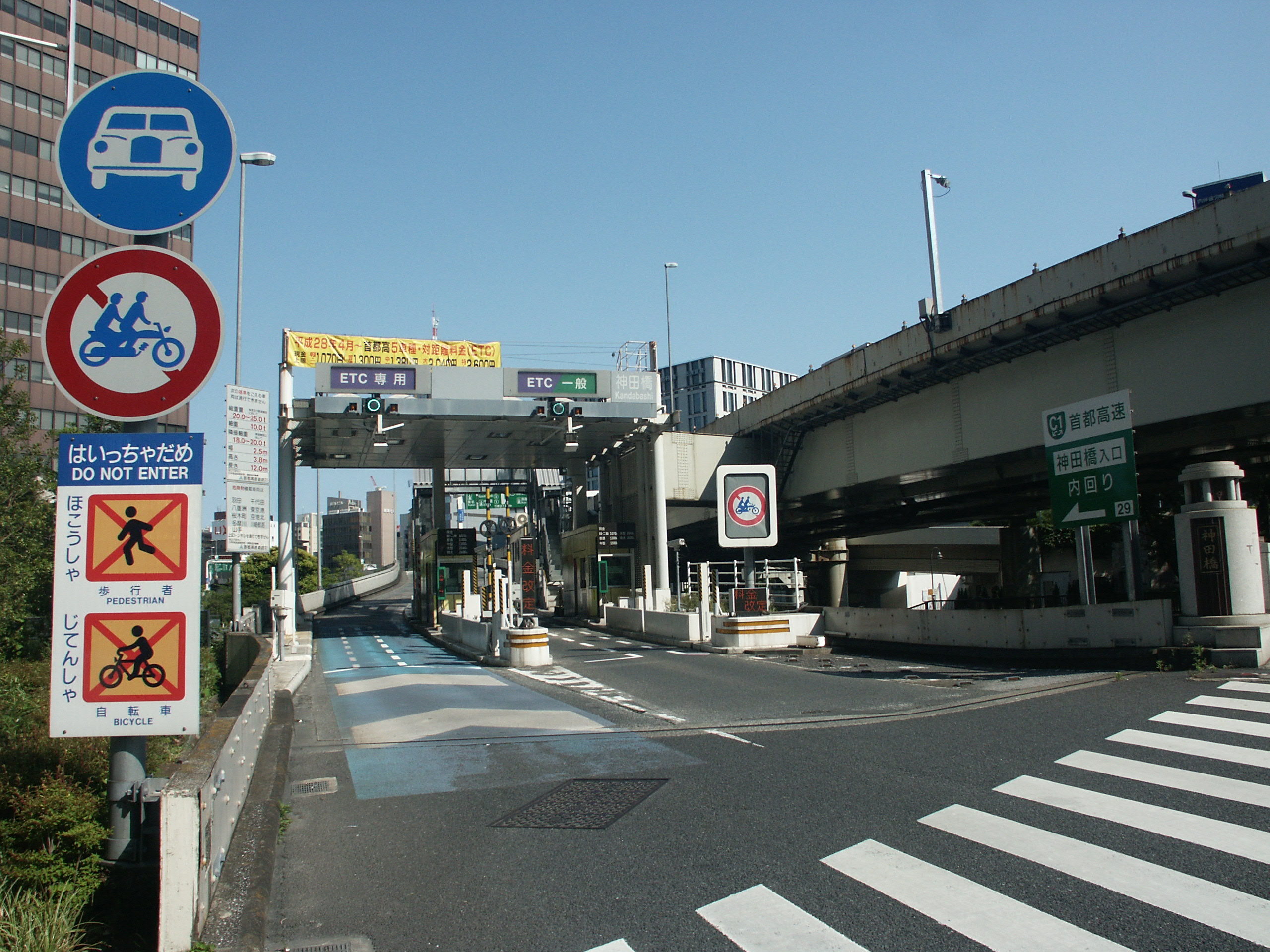 首都高速道路都心環状線神田橋内回り料金所